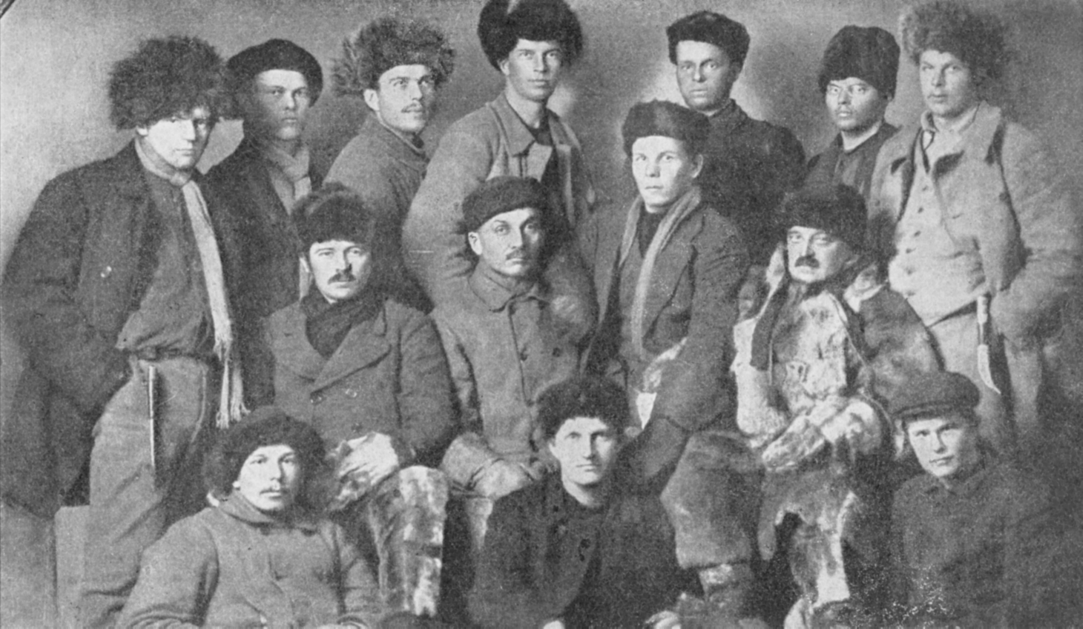 Värväreitä ja etappimiehiä